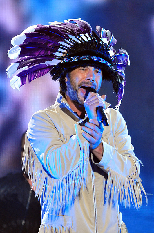 Foto de Jay Kay en un concierto el año 2011.